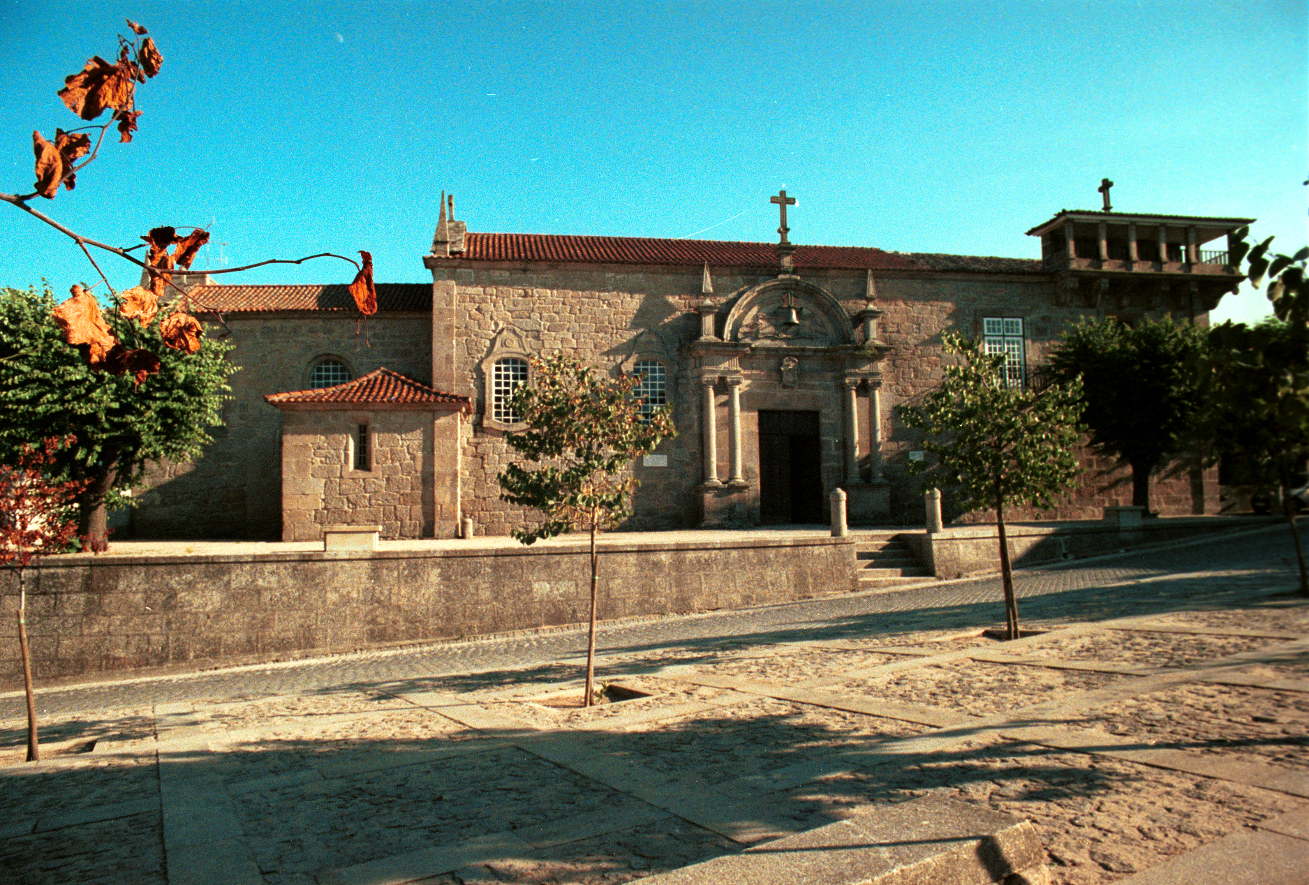 Antigo Convento Beneditino de Nossa Senhora da Purificação